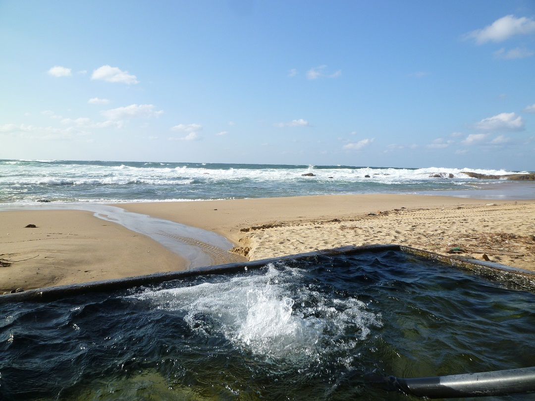 琴引浜（京都府京丹後市網野町掛津）にある温泉